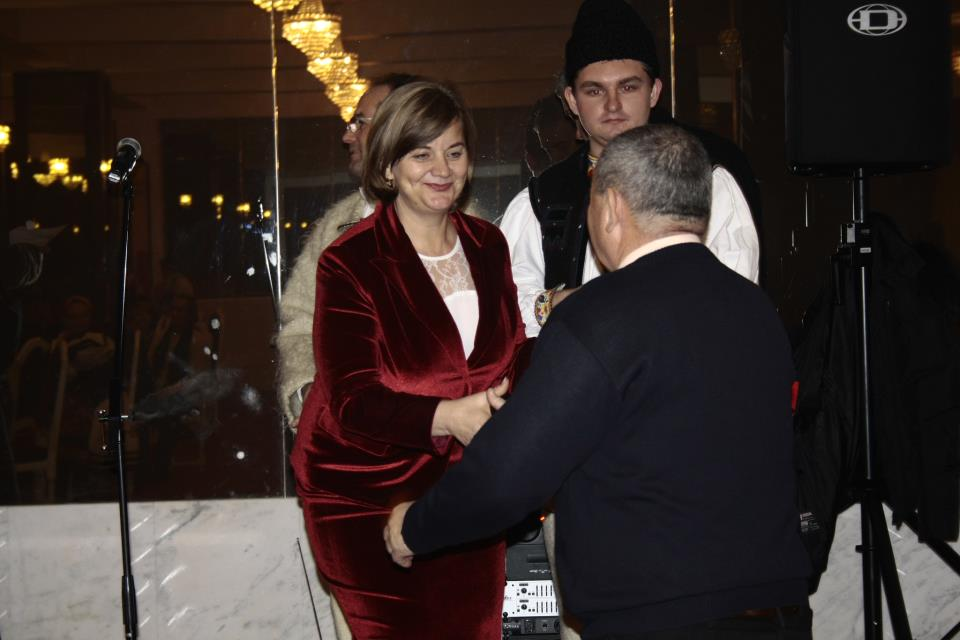 Ceremonia de premiere - Festivalul Datinilor şi Obiceiurilor de Iarnă” Negreşti-Oaş